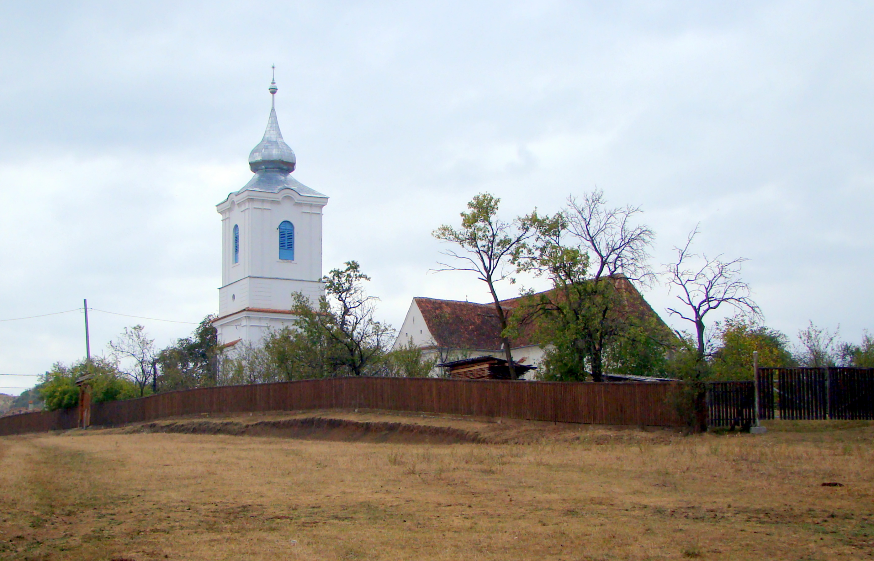 Ansamblul bisericii reformate sat Albiș; comuna Cernat